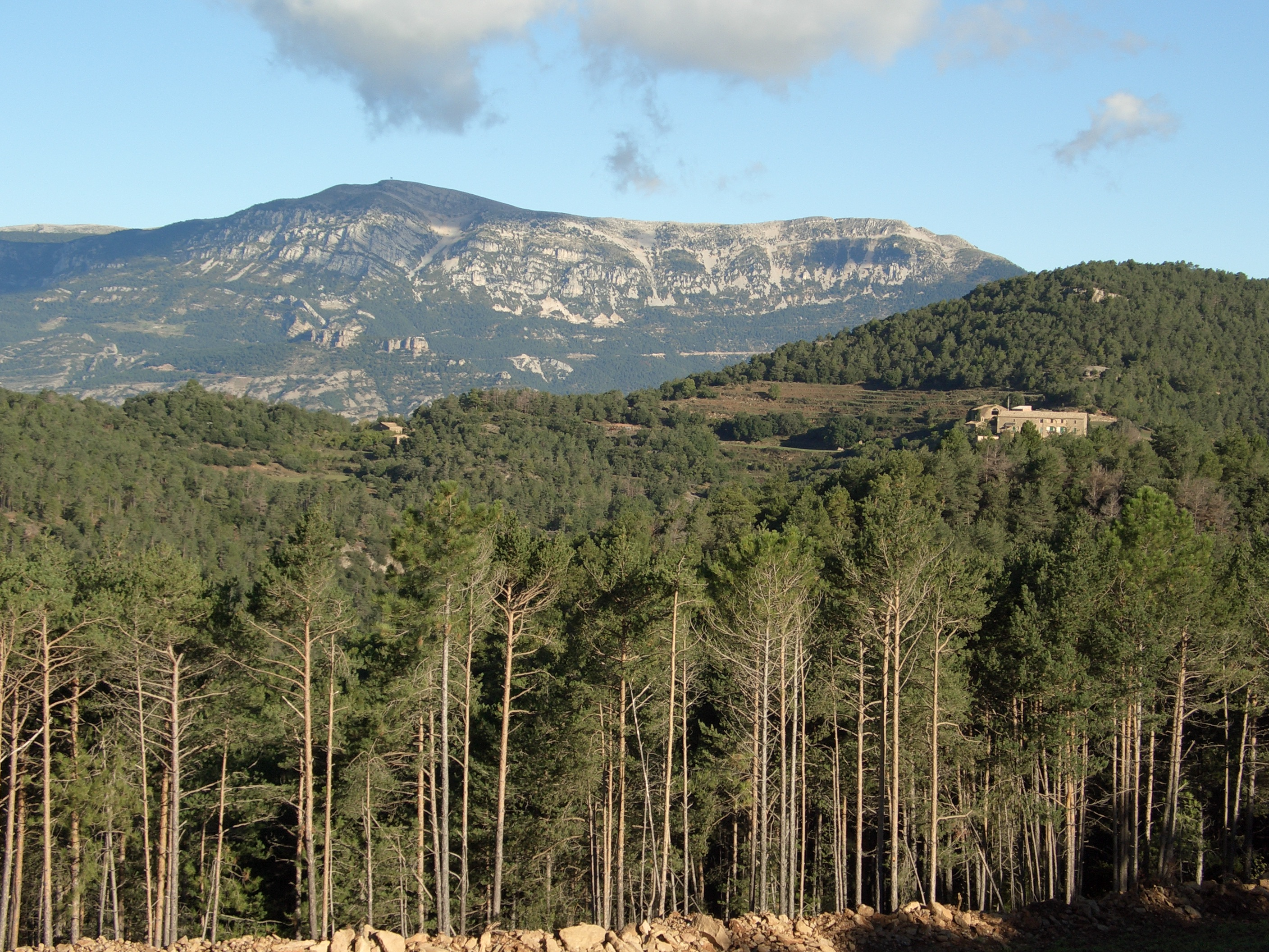 Port del Comte des del camí de Busa. A la dreta la masia de Guilanyà